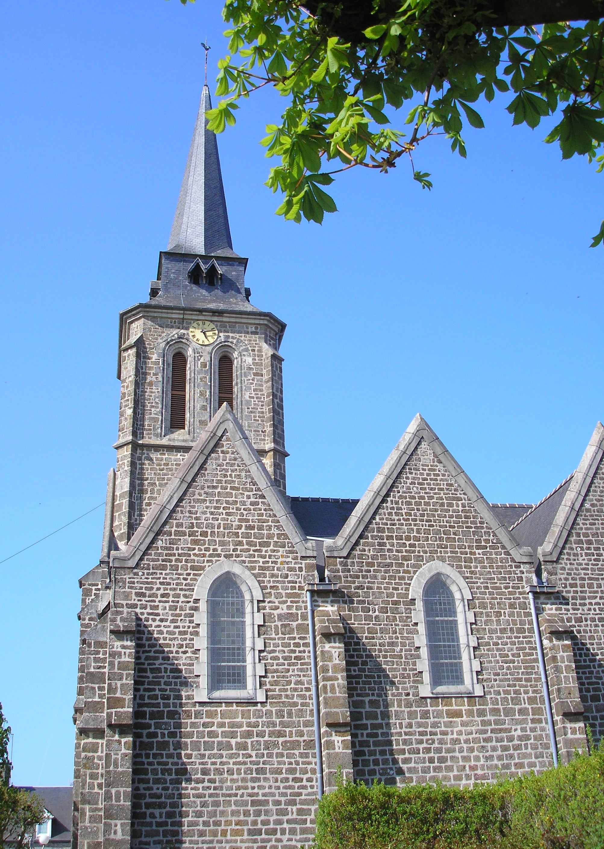 Fougerolles-du-Plessis (Pays de la Loire, France). Église de l'Immaculée Conception.